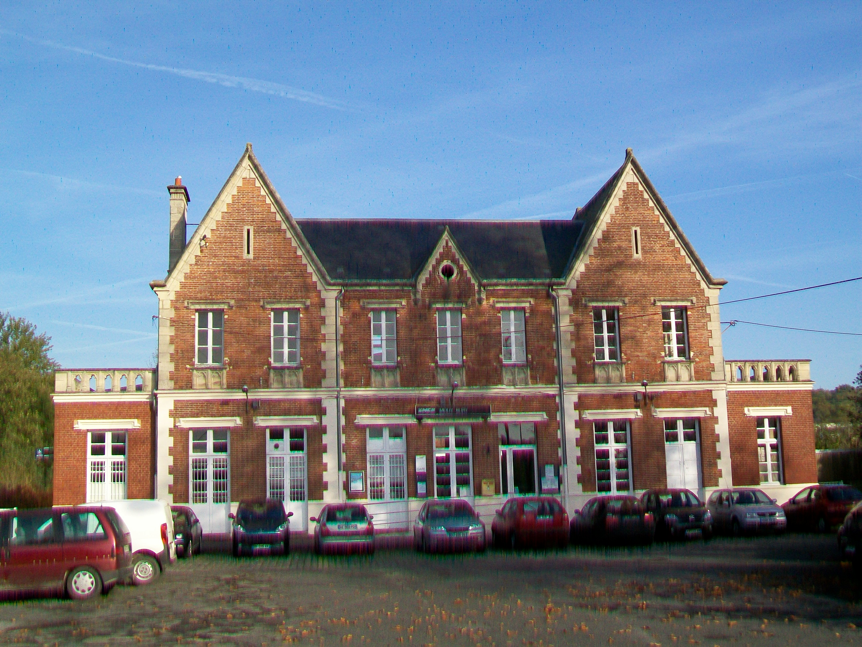 Le bâtiment-voyageurs, côté ville (Mouy).